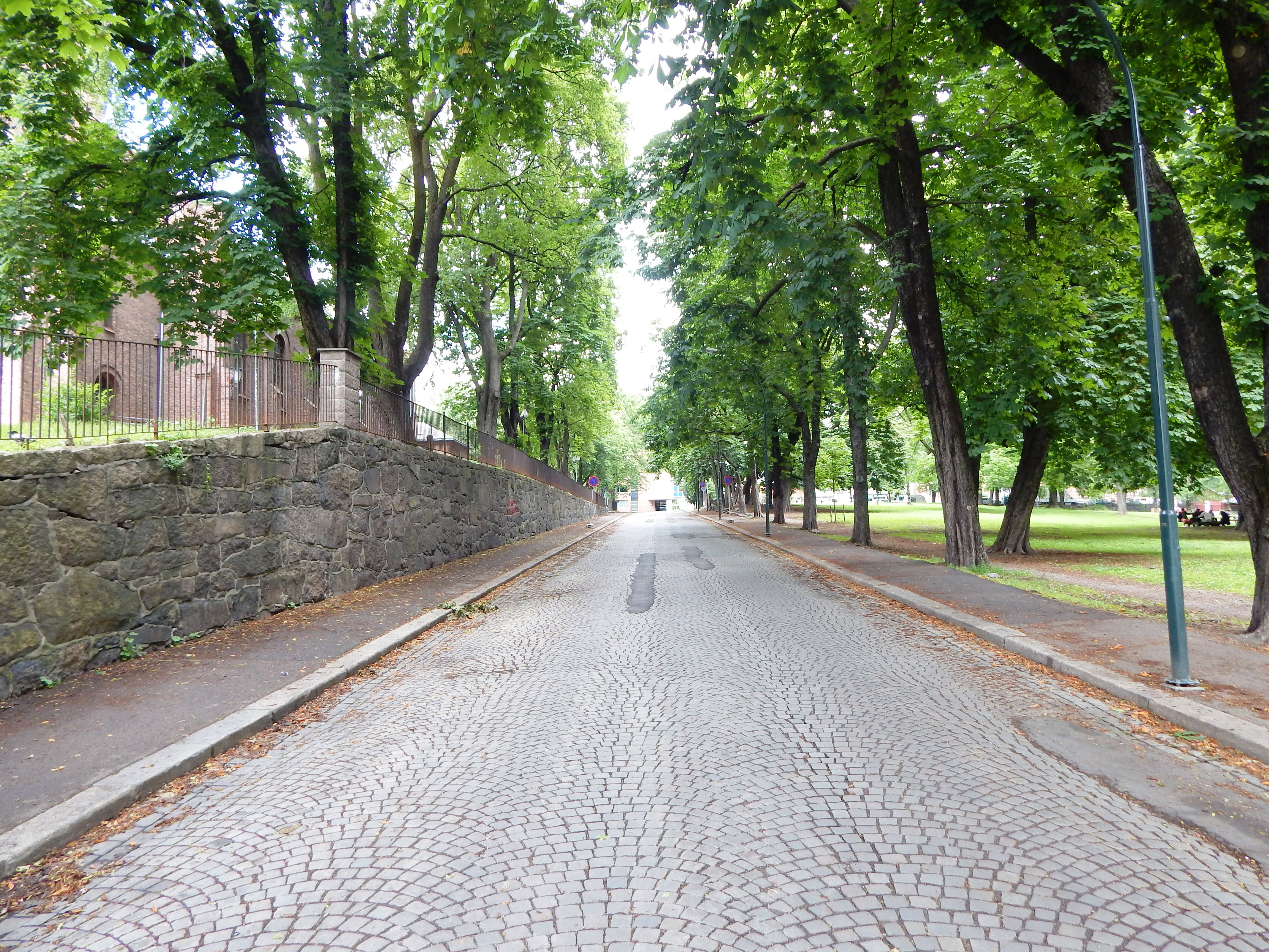 Rathkes gate går forbi Sofienberg kirke gjennom Sofienbergparken.